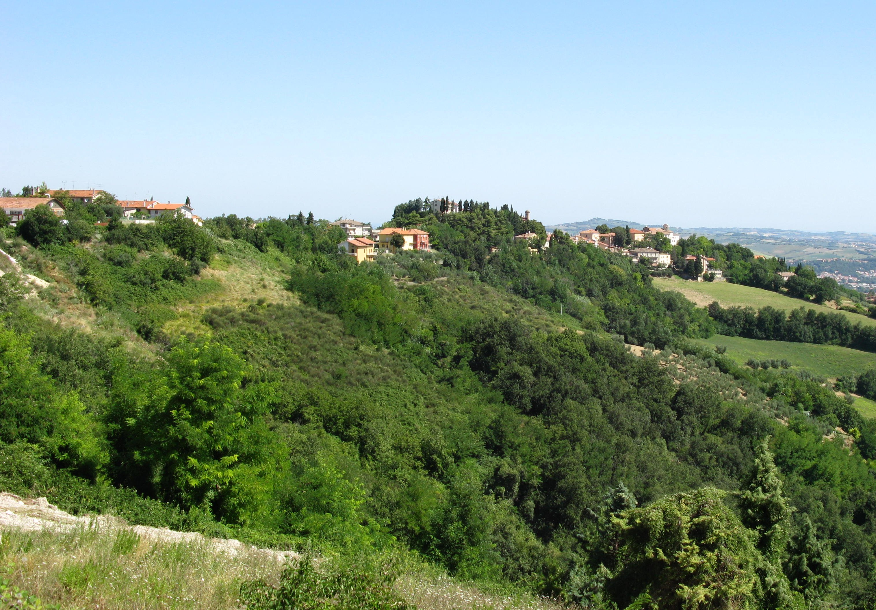 Panorama di Colbordolo.